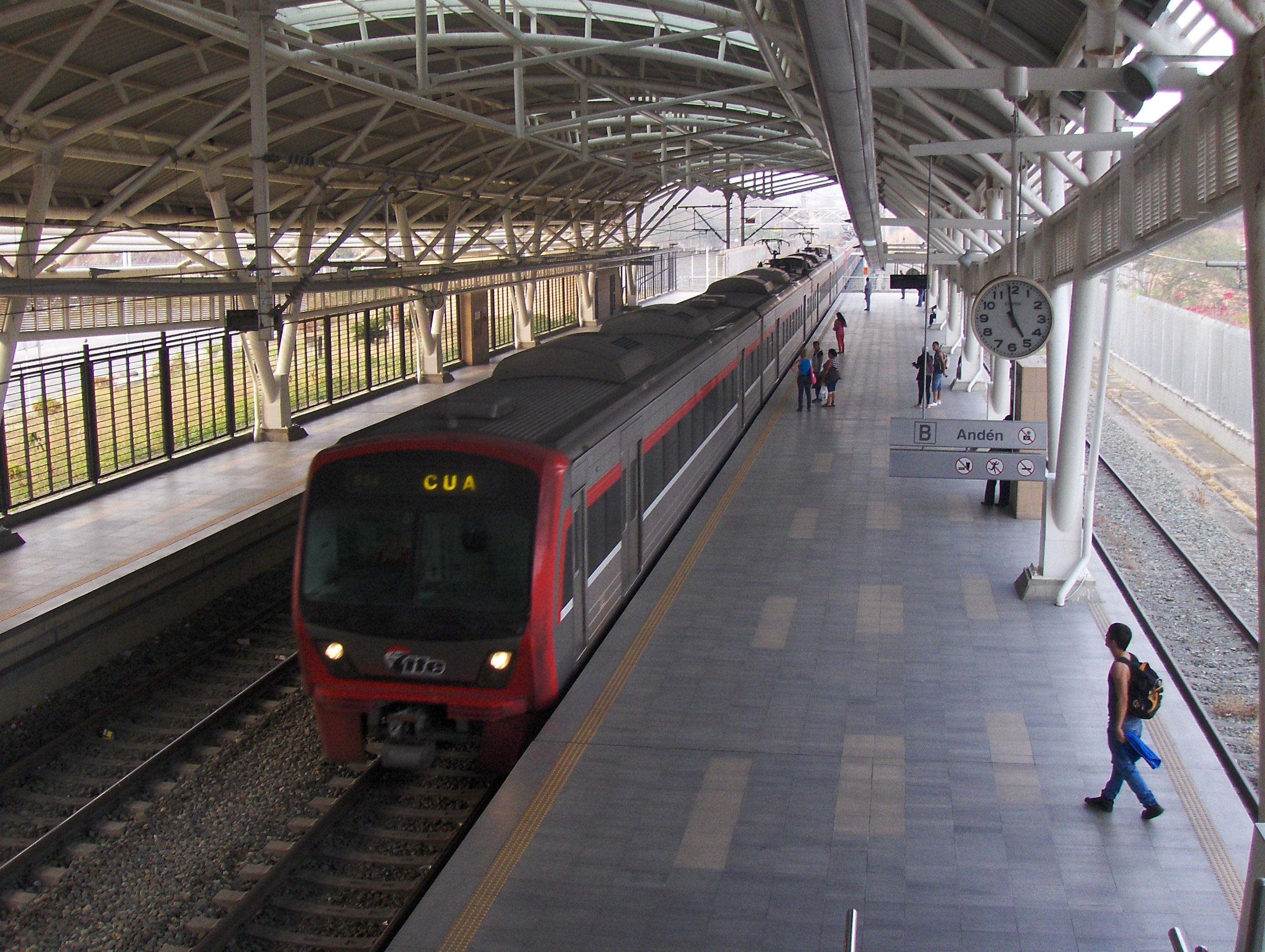 Tren nuevo entrendo a estación Cua